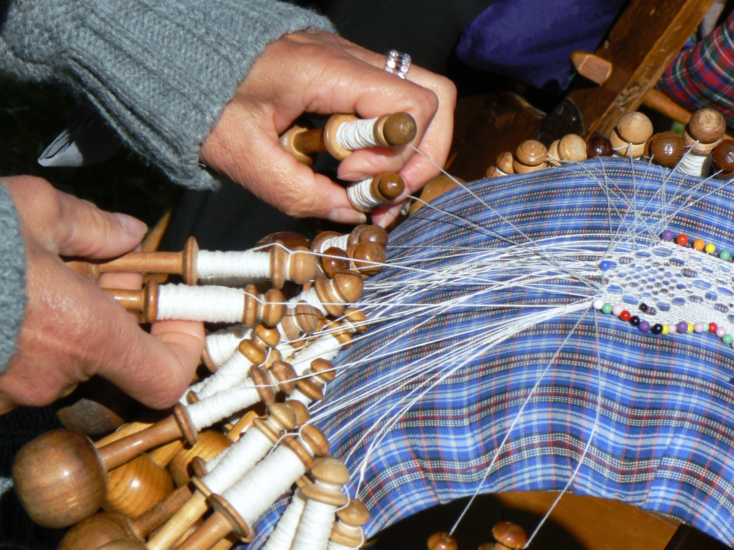 Lavorazione delle dentelles di Cogne